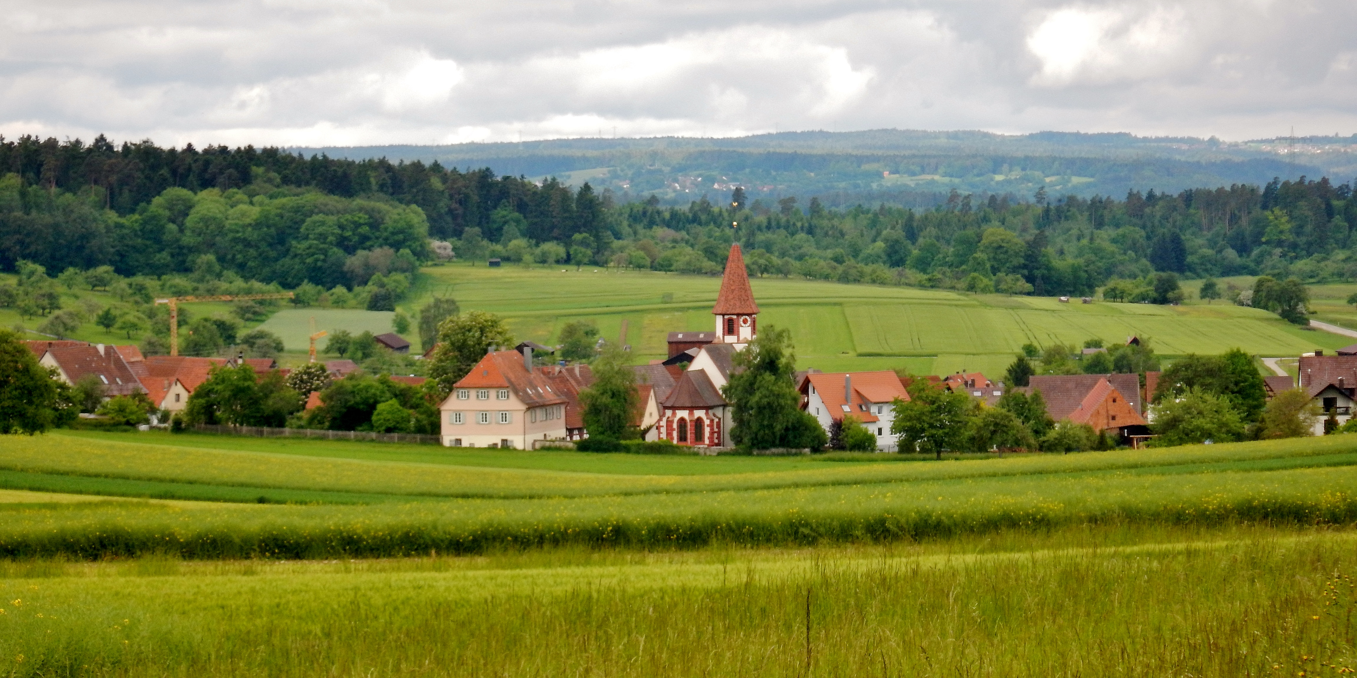 Ausblick vom Schwarzwald-Schwäbische-Alb-Allgäu-Weg (HW 5) auf Möttlingen